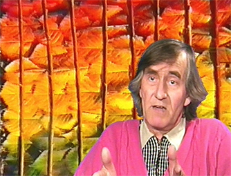 Portrait de Nils Udo